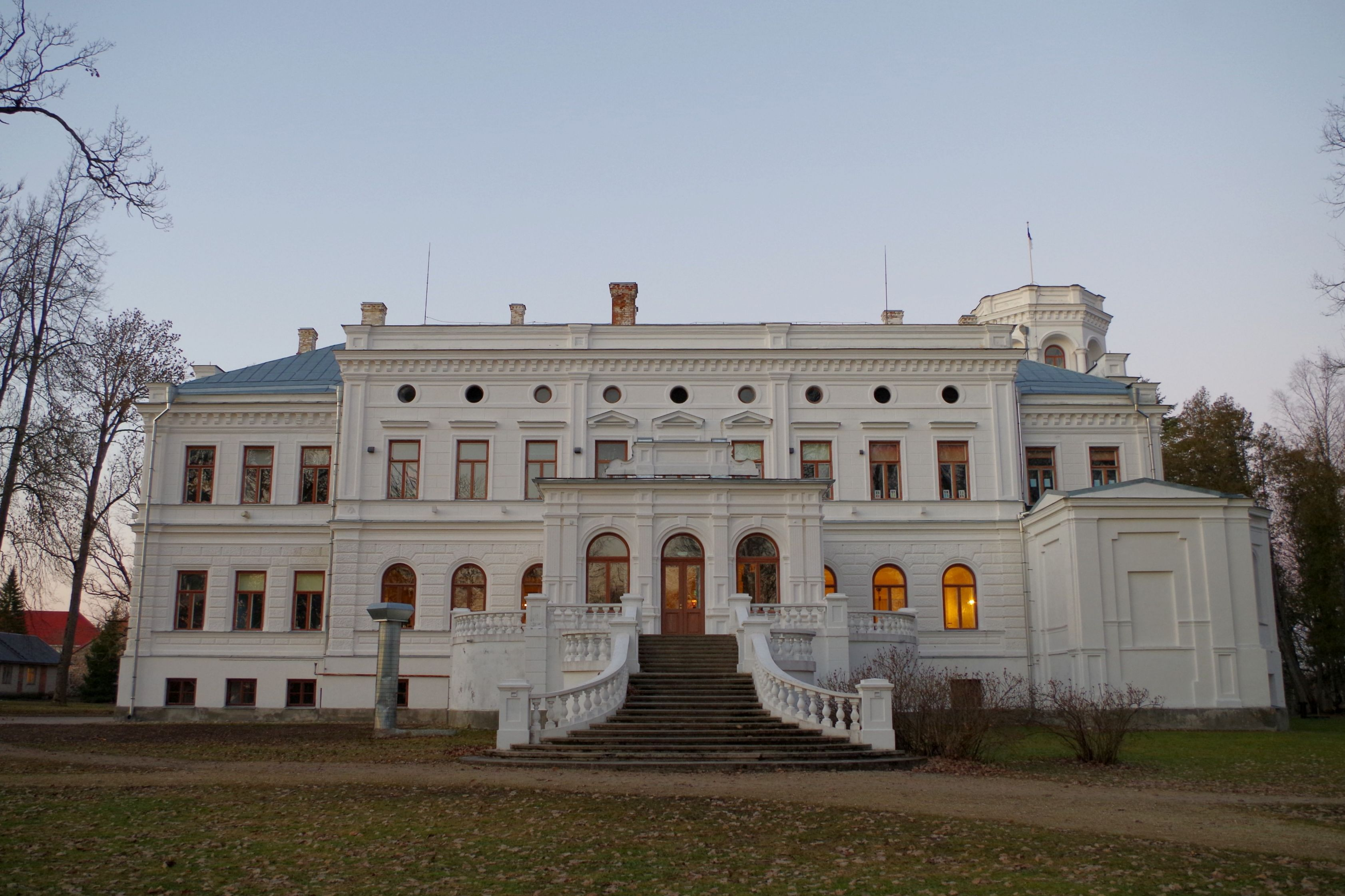 Puurmani mõisa peahoone